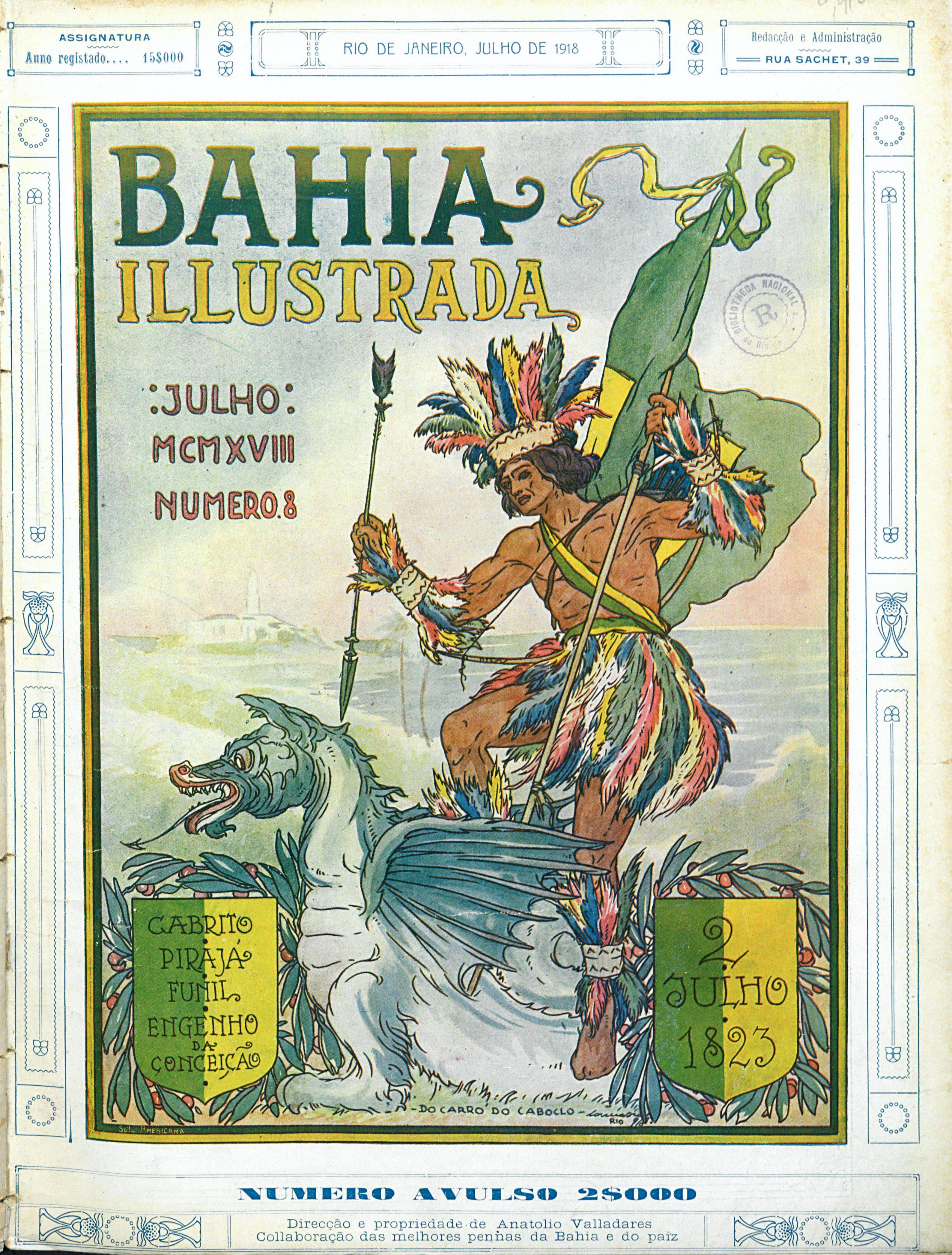 Capa do número 8 da revista sediada no Rio de Janeiro, "Bahia Illustrada", de sua edição de julho de 1918 em que faz menção à alegoria do índio ou caboclo a derrotar o "dragão da tirania"; a data faz menção às lutas da Independência do Brasil, concretizada somente após a Independência da Bahia do domínio português, a 2 de julho de 1823.